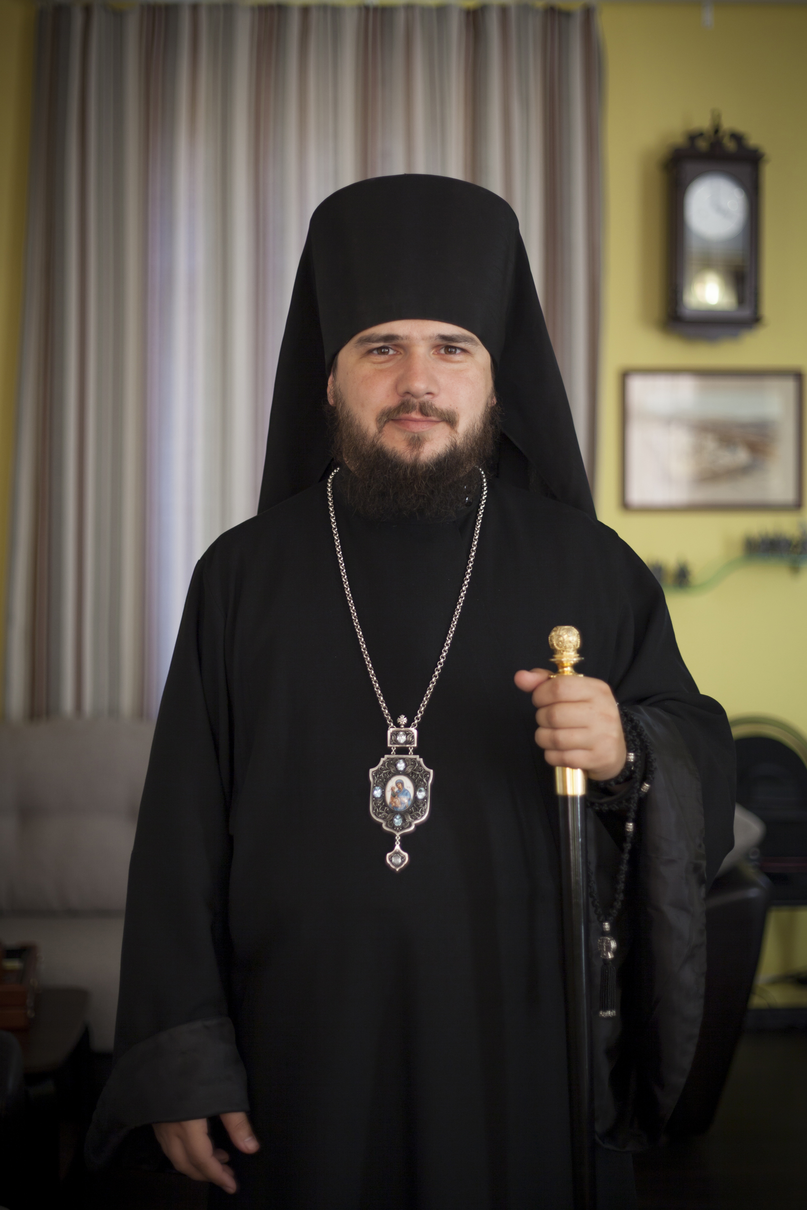 Официальное фото